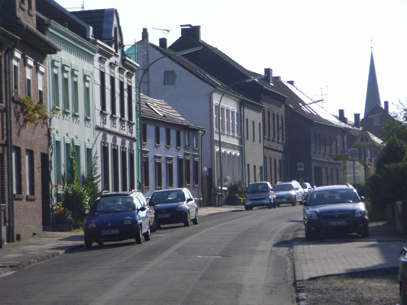 Hückelhoven-Kleingladbach